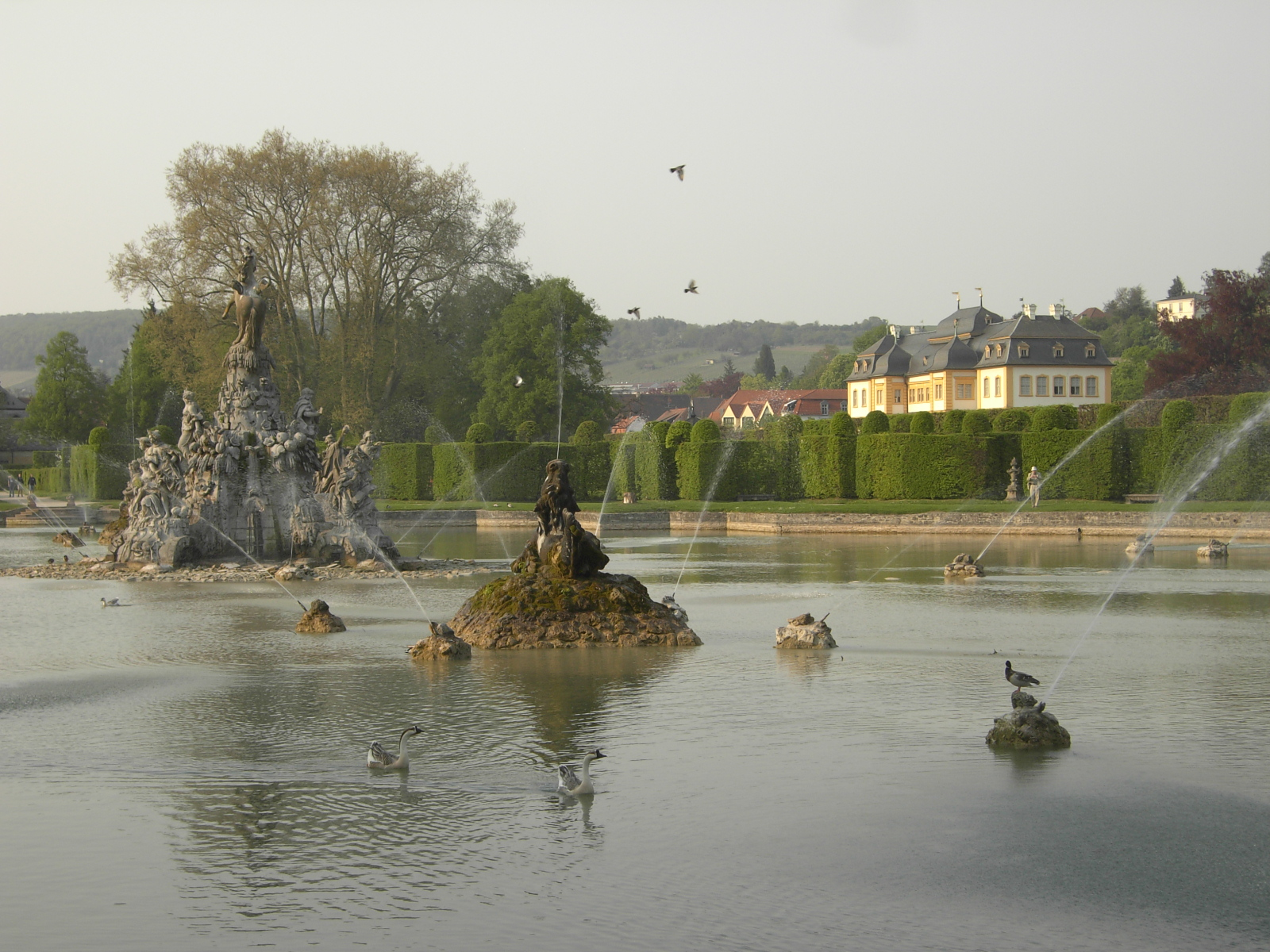 Großer See im Schlossgarten Veitshöchheim mit Musenberg Parnass